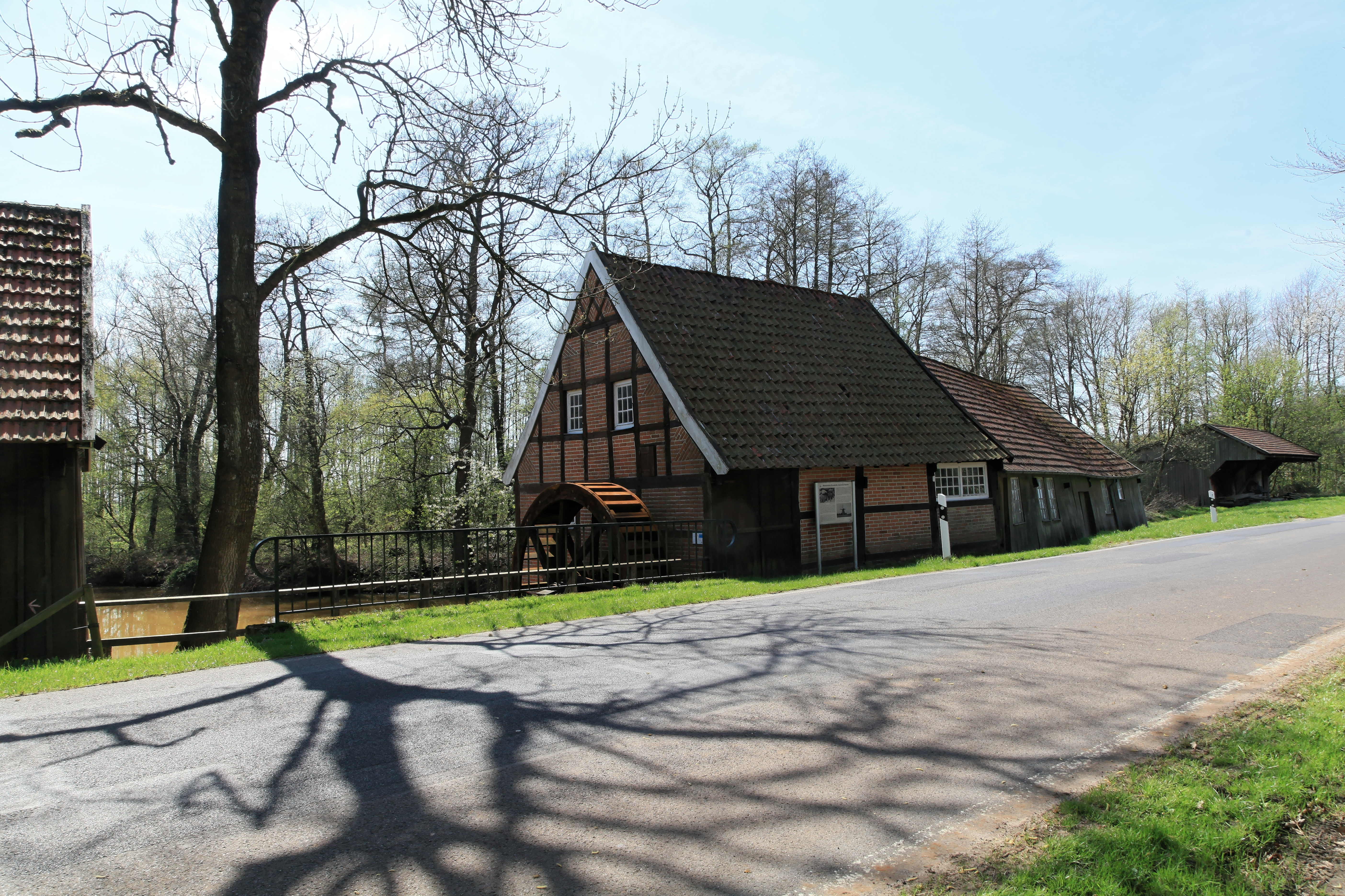 Wassermühle Bruneforth an der der Staverner Straße in Stavern